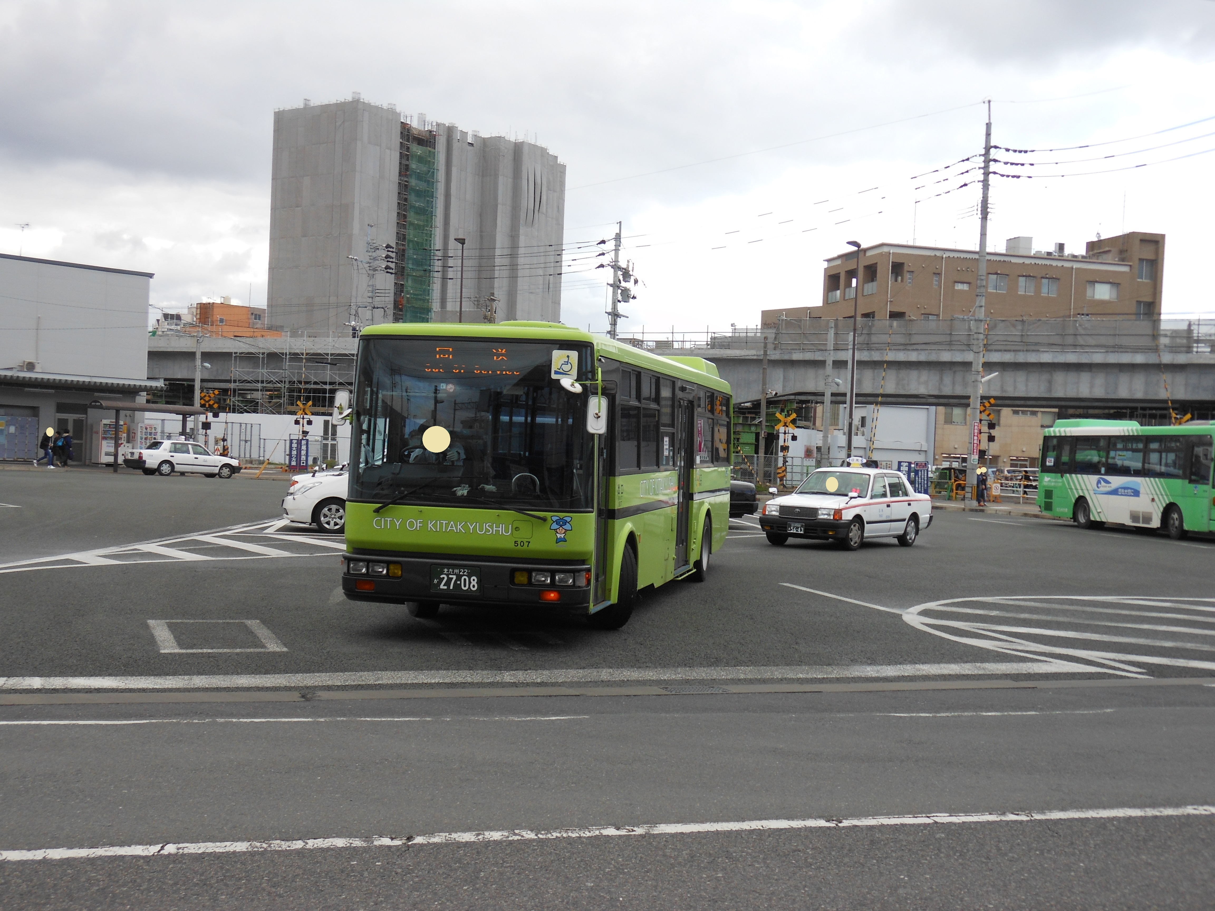 北九州市営バスのU-JM210GTN